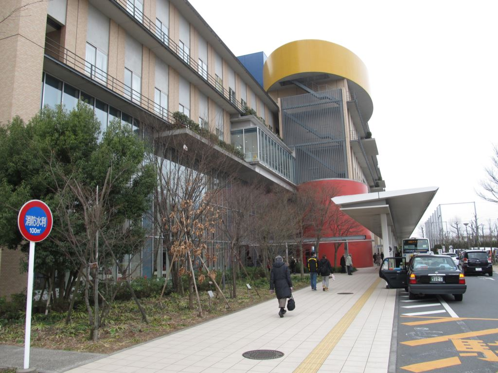 東京都立多摩医療センター